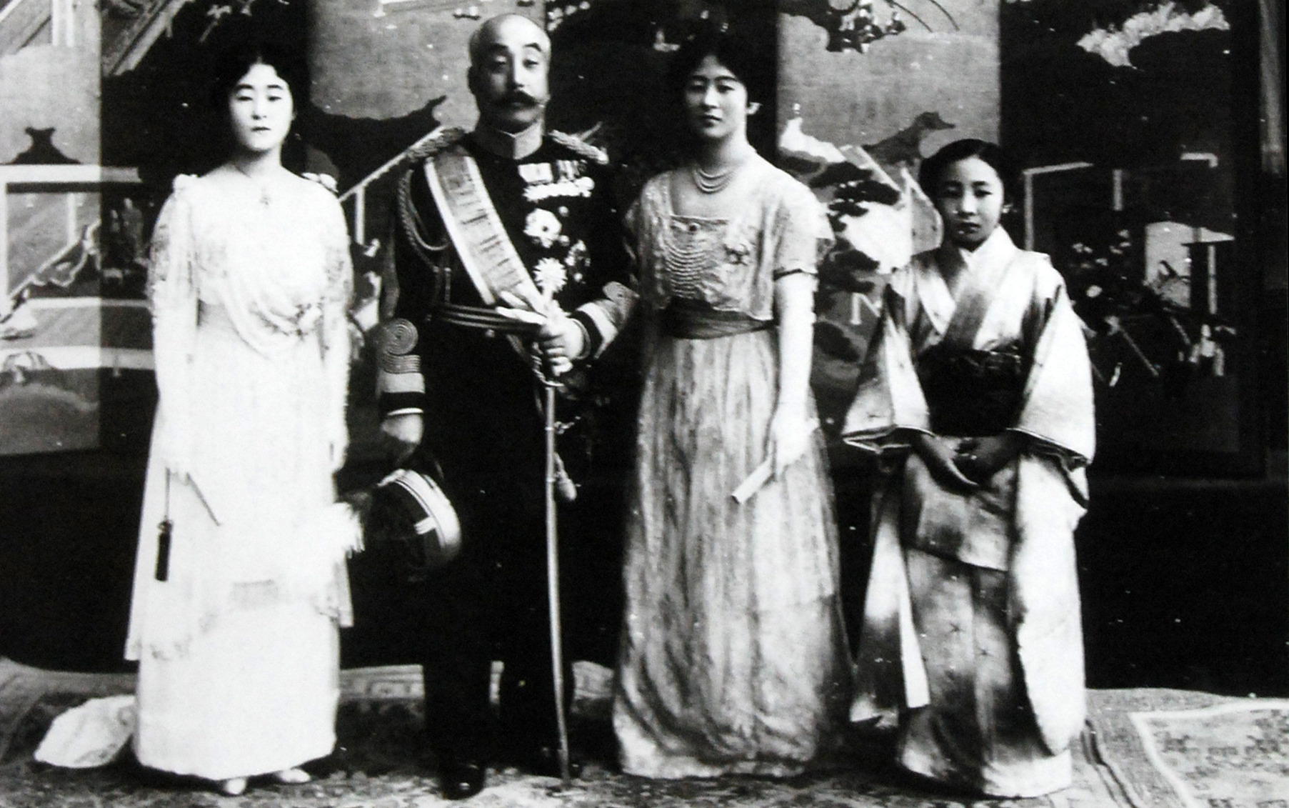 梨本宮一家。方子女王（李方子）の納采の儀の記念写真。